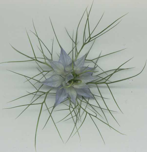 Nigella damascena - Jungfer im GrünenLove in the Mist